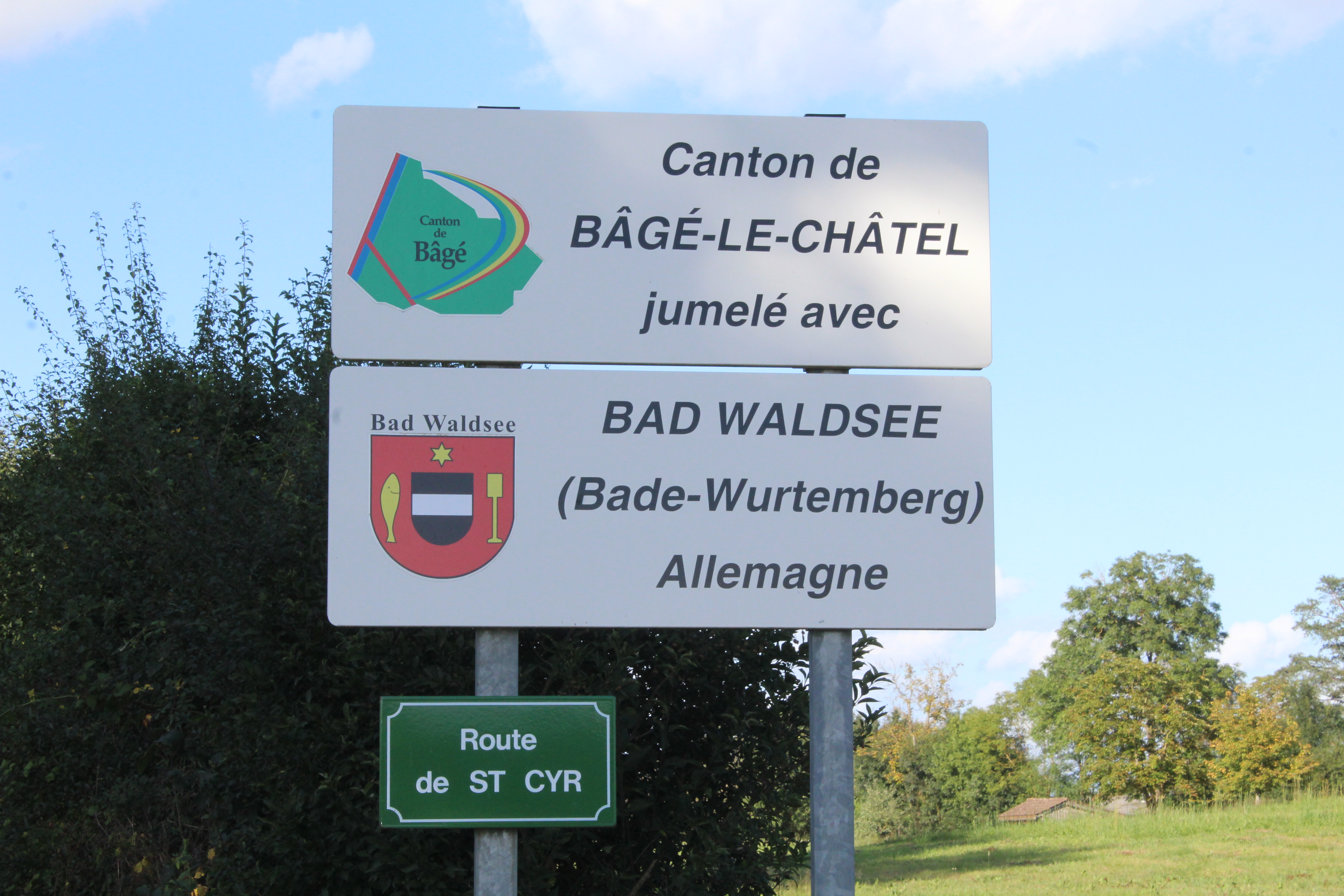 Panneau annonçant le jumelage entre le canton de Bâgé-le-Châtel et Bad Waldsee à l'entrée de Bâgé-la-Ville.